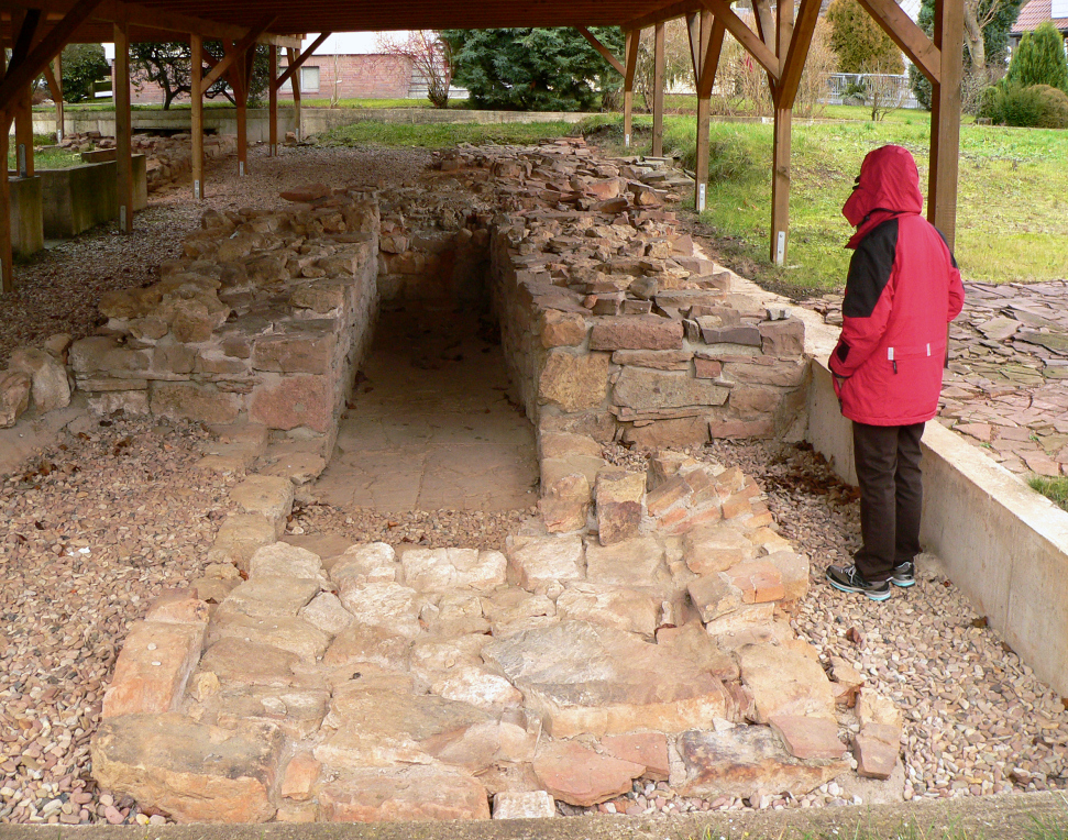 Glasmanufaktur Holzen, Hauptofen